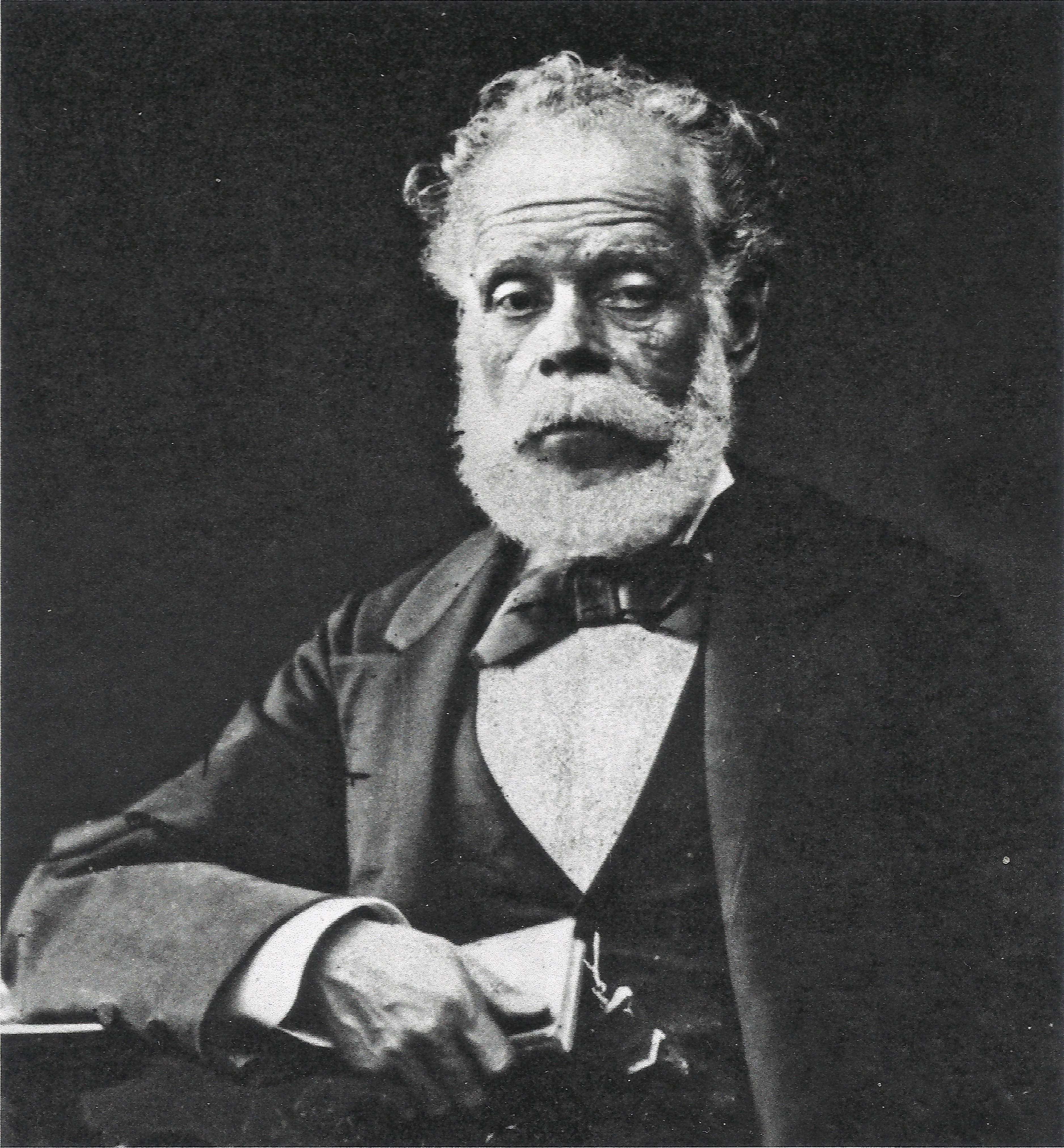 Pancho Fierro (c.1807-1879), acuarelista peruano.